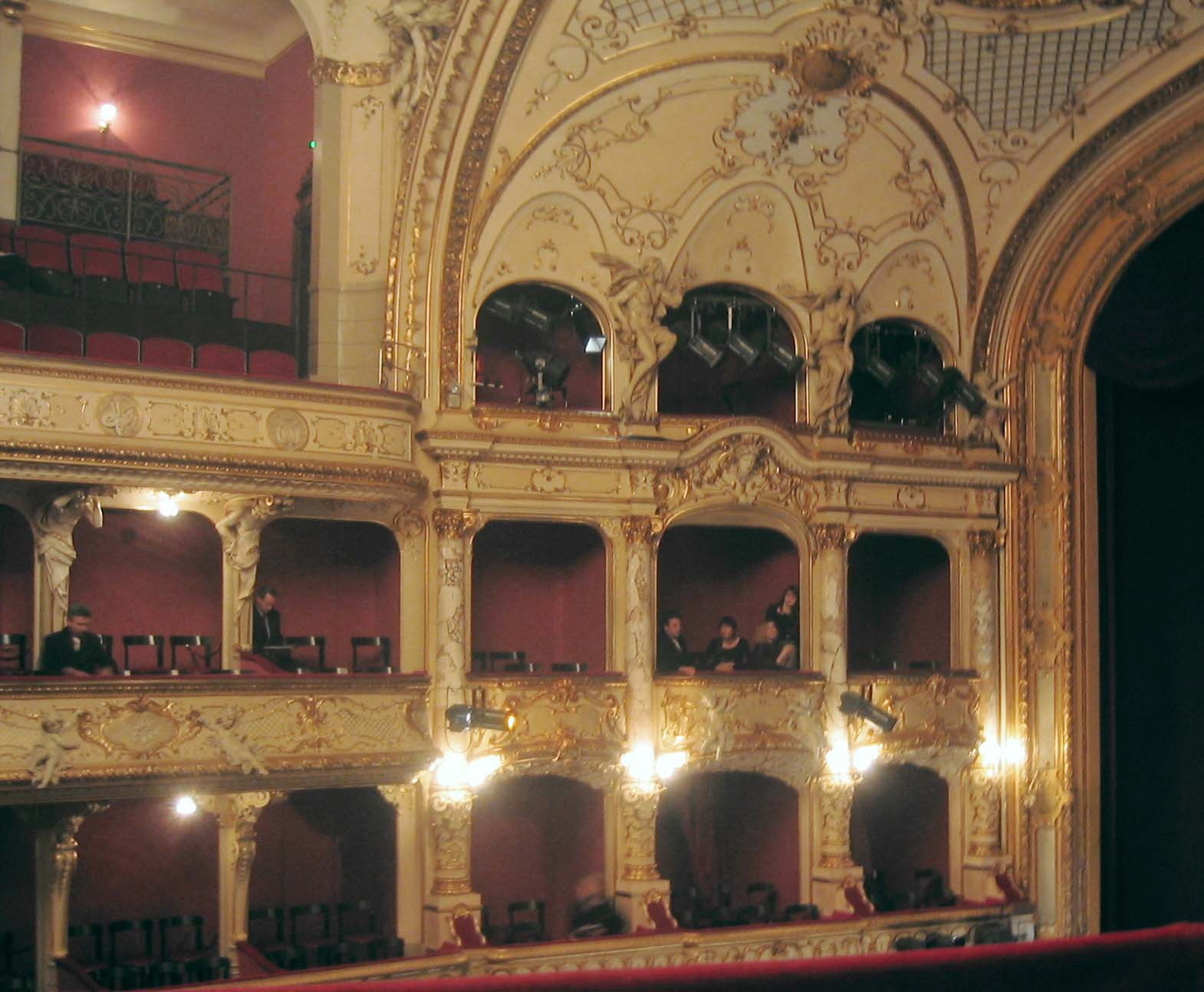 Opernhaus Zürich, Zuschauerraum